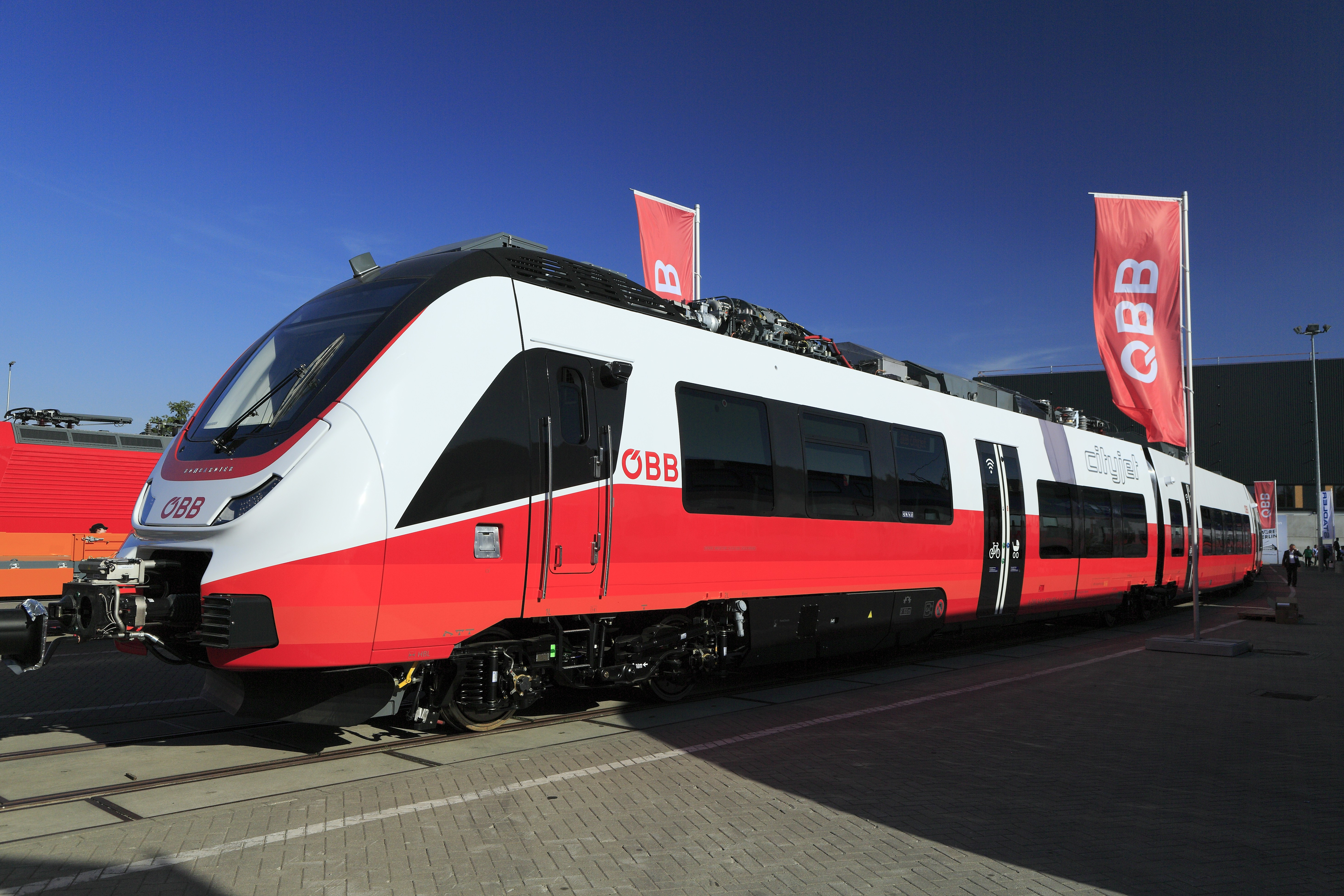 Talent 3 im »Cityjet«-Anstrich, in diesem sollen sie in Vorarlberg eingesetzt werden.